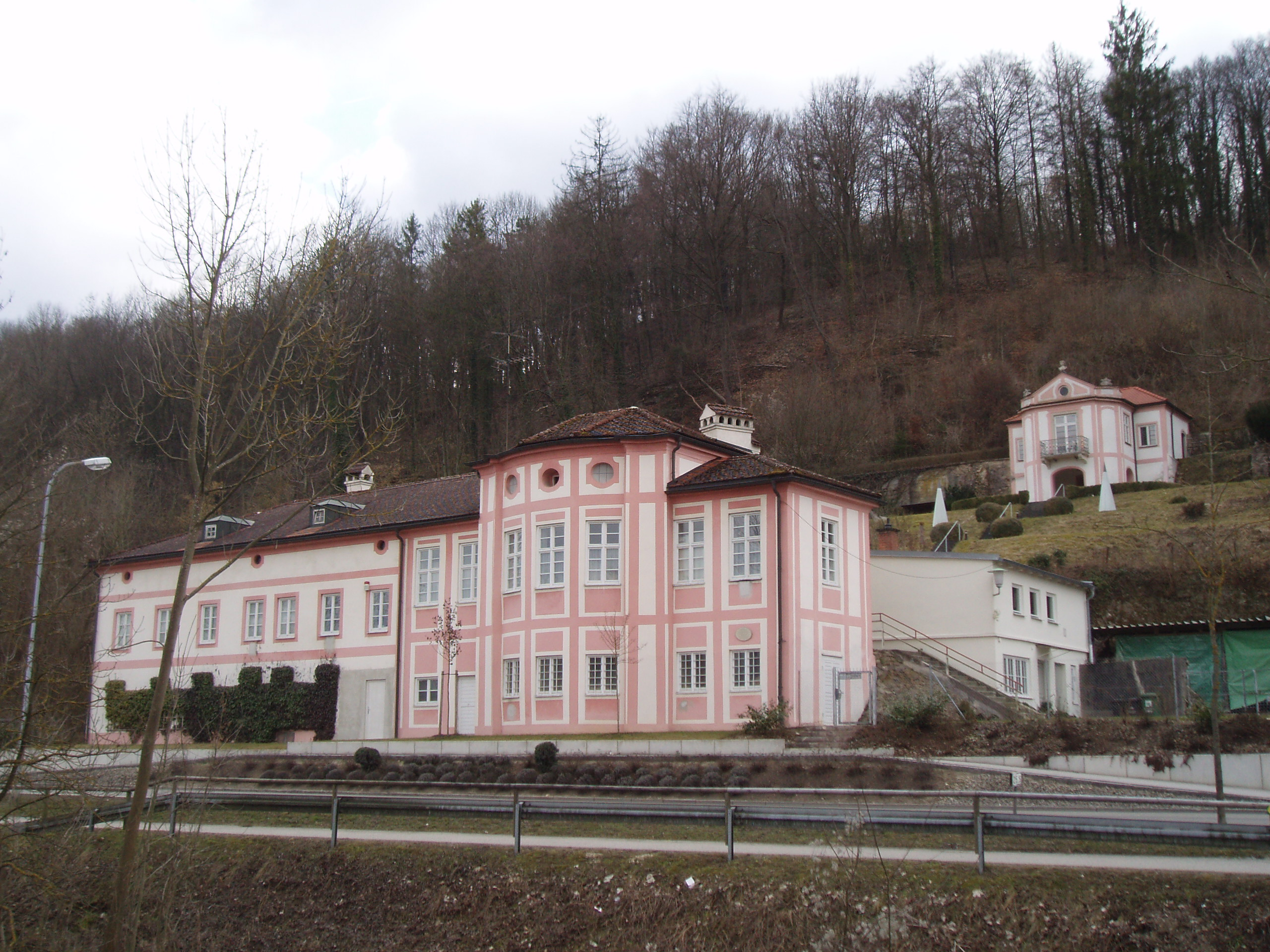 Cobenzl-Schlösschen_in_Eichstätt_(Bayern) von Gabriel de Gabrieli